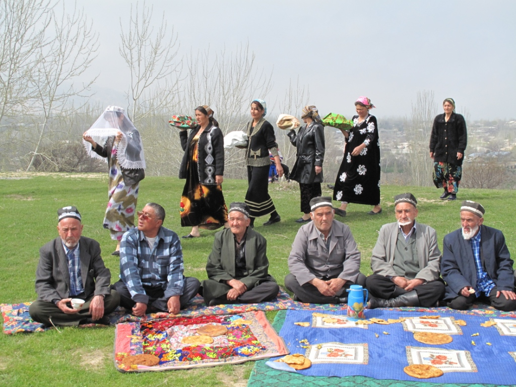 Праздник в сельской местности - Иди "Навруз", Таджикистан